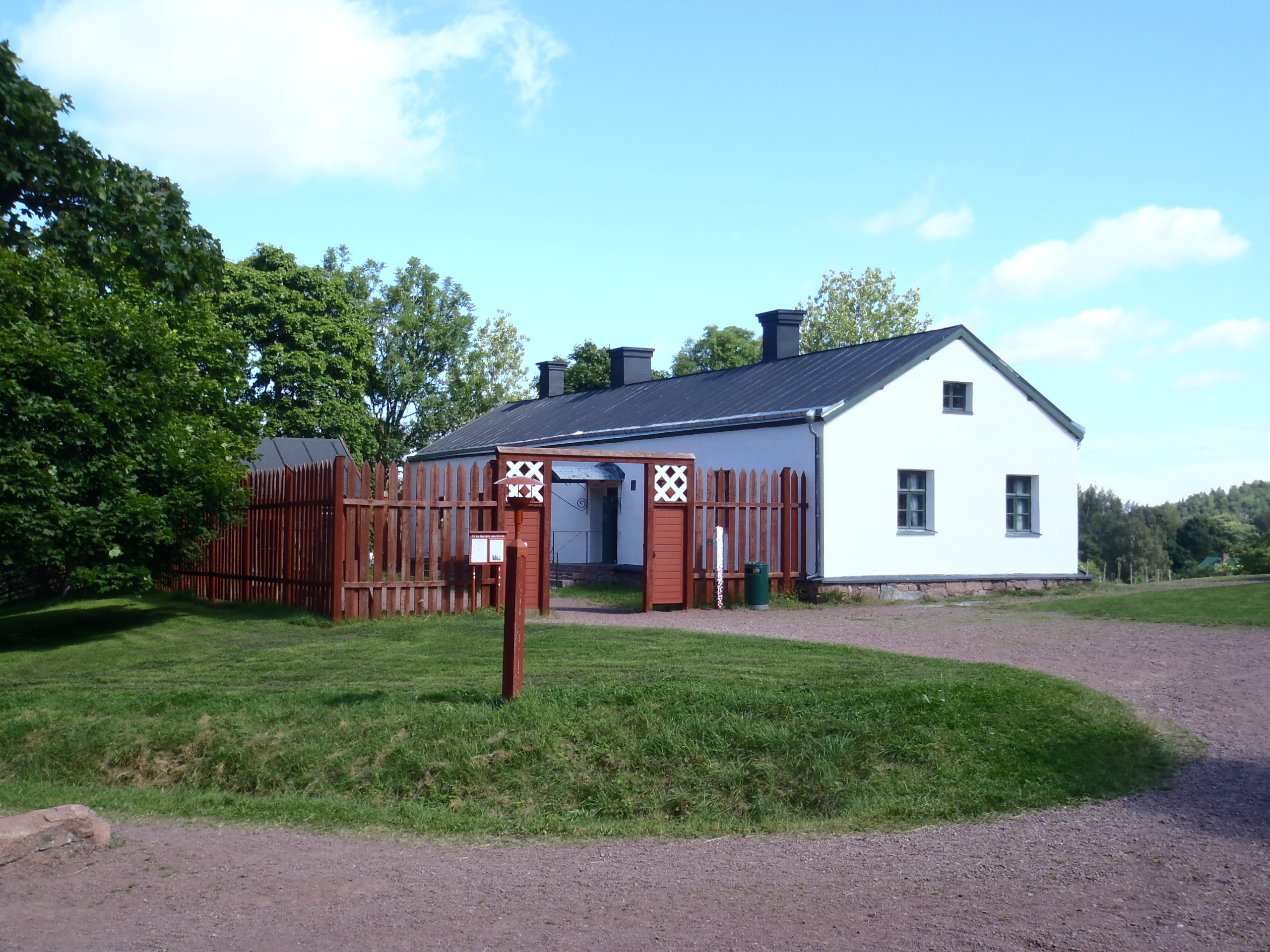 Kronohäktet Vita Björn i Sund, Åland.